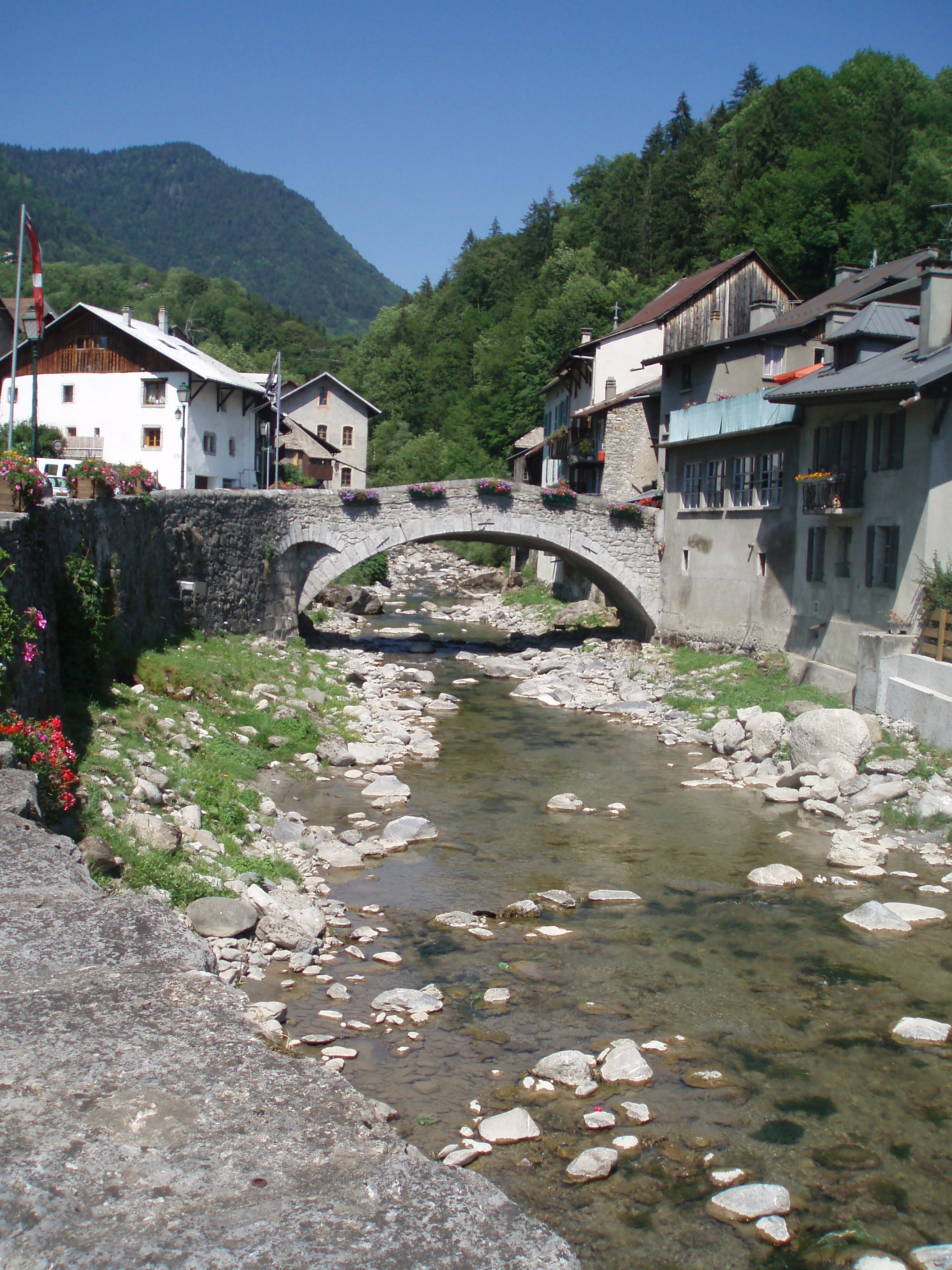 Le vieux village de Taninges et le Foron (affluent de la Giffre).